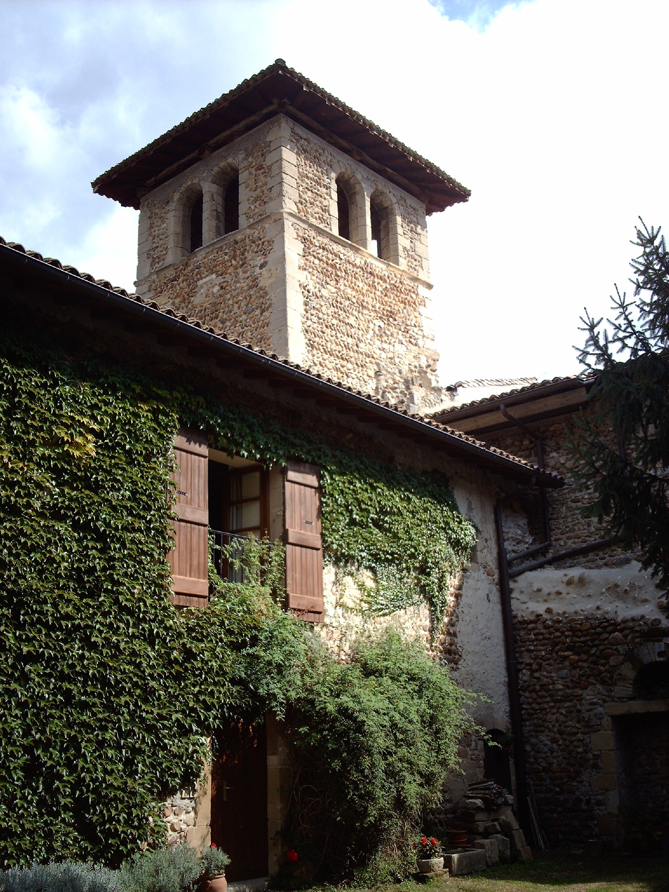 Prieuré de Salaise-sur-Sanne, Le Clos (Classé Inscrit Inscrit, 1913 1987 1996)